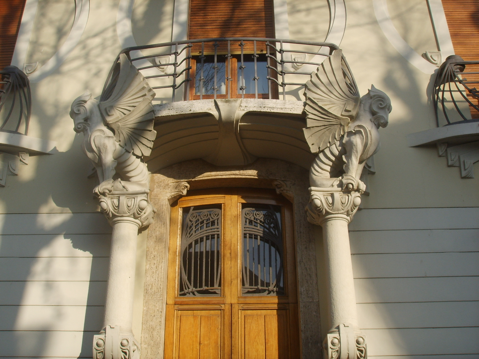 Villino_Lampredi in Florence